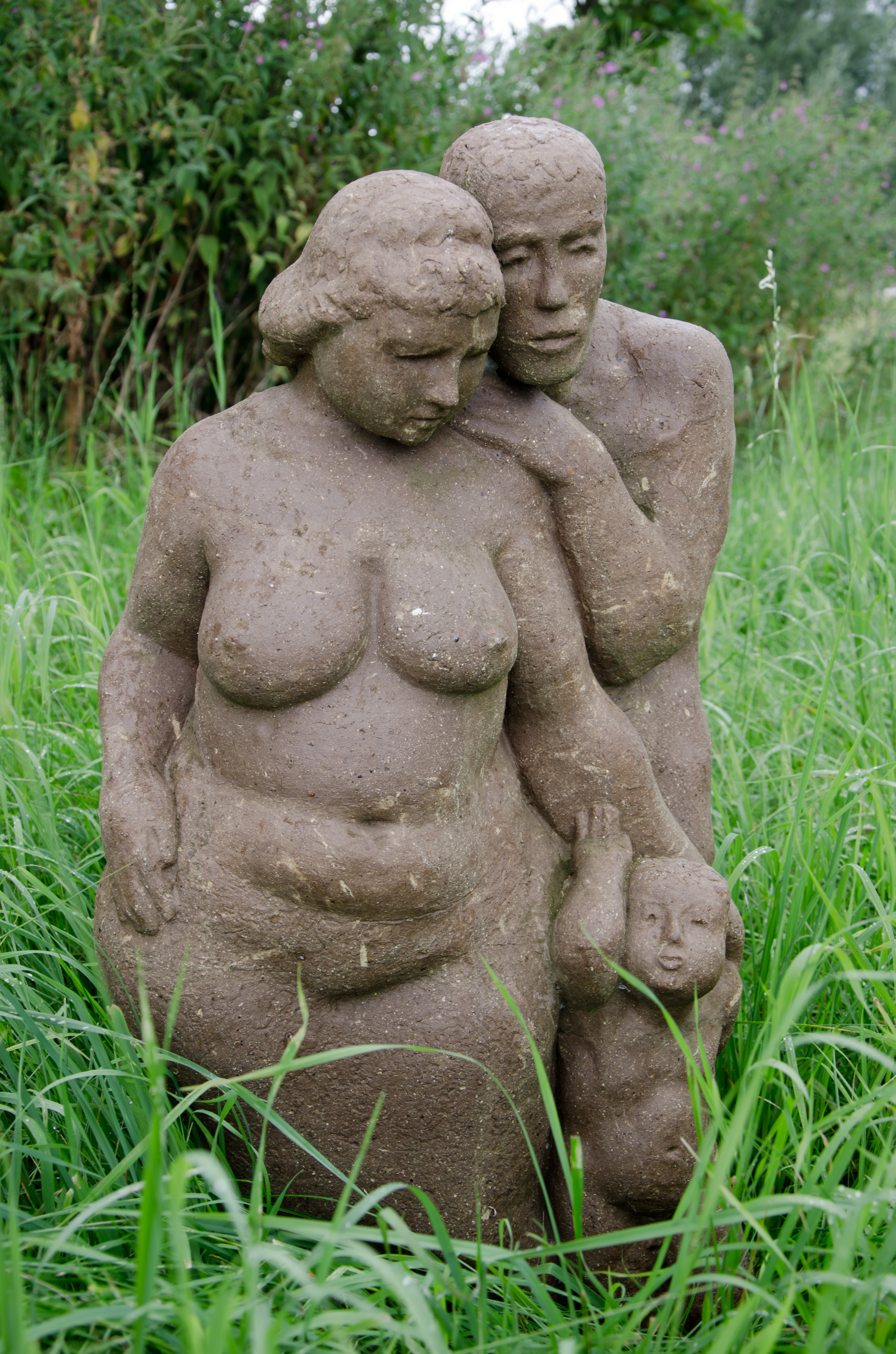 Fritz Böhme - "Familie WL 312" im Skulpturenpark Glashagen